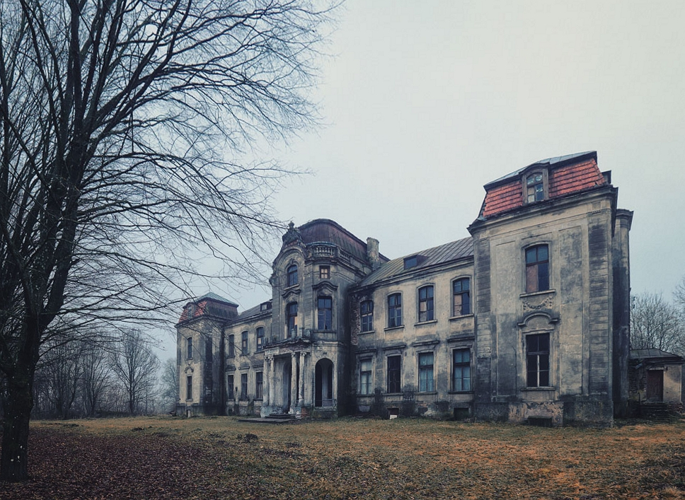 Беларуская (тарашкевіца): Комплекс былога палацу:палацфлігельрэшткі былога млынукузьнягаспадарчыя пабудовырэшткі былога парку. г.п. Жалудок This is a photo of Belarusian heritage monument. Reference number: 412Г000627 ( WLM)